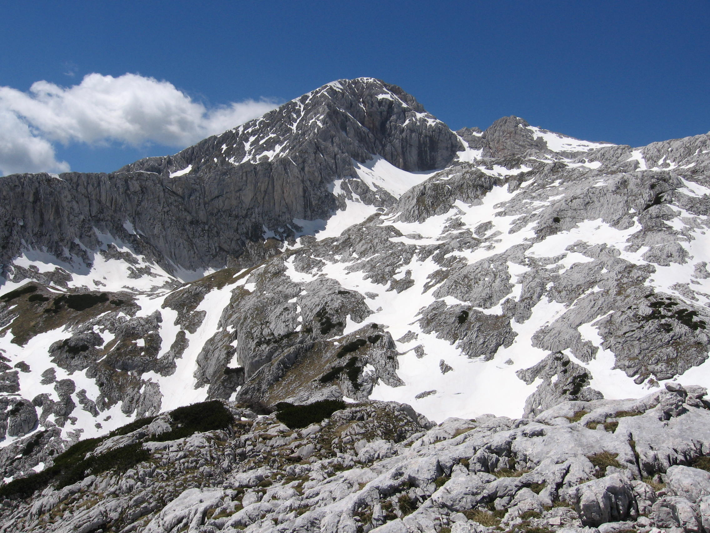 Grintovec z vrha Kogla